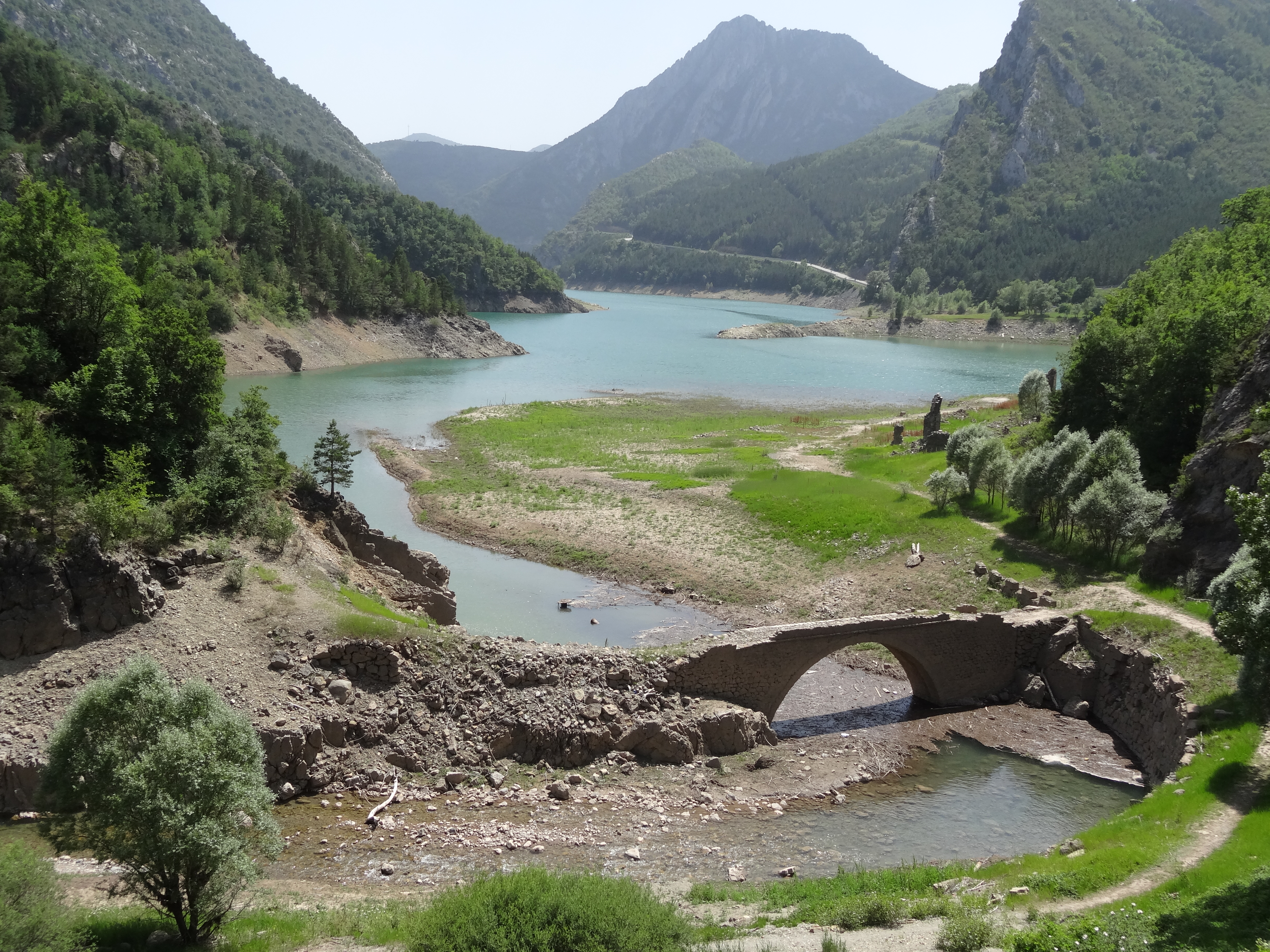 Rivera del Convent - Pantà d’Escales